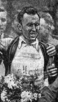 Maurice Desimpelaere vainqueur de Paris-Roubaix, le 9 avril 1944.